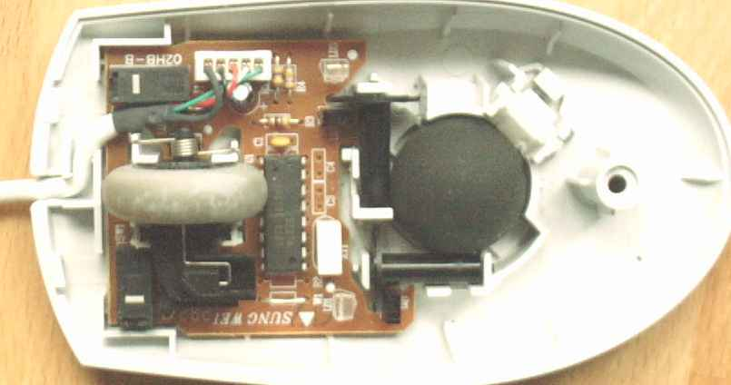 Foto van een open computermuis - foto zelf genomen en hierbij onder de GFDL geplaatst